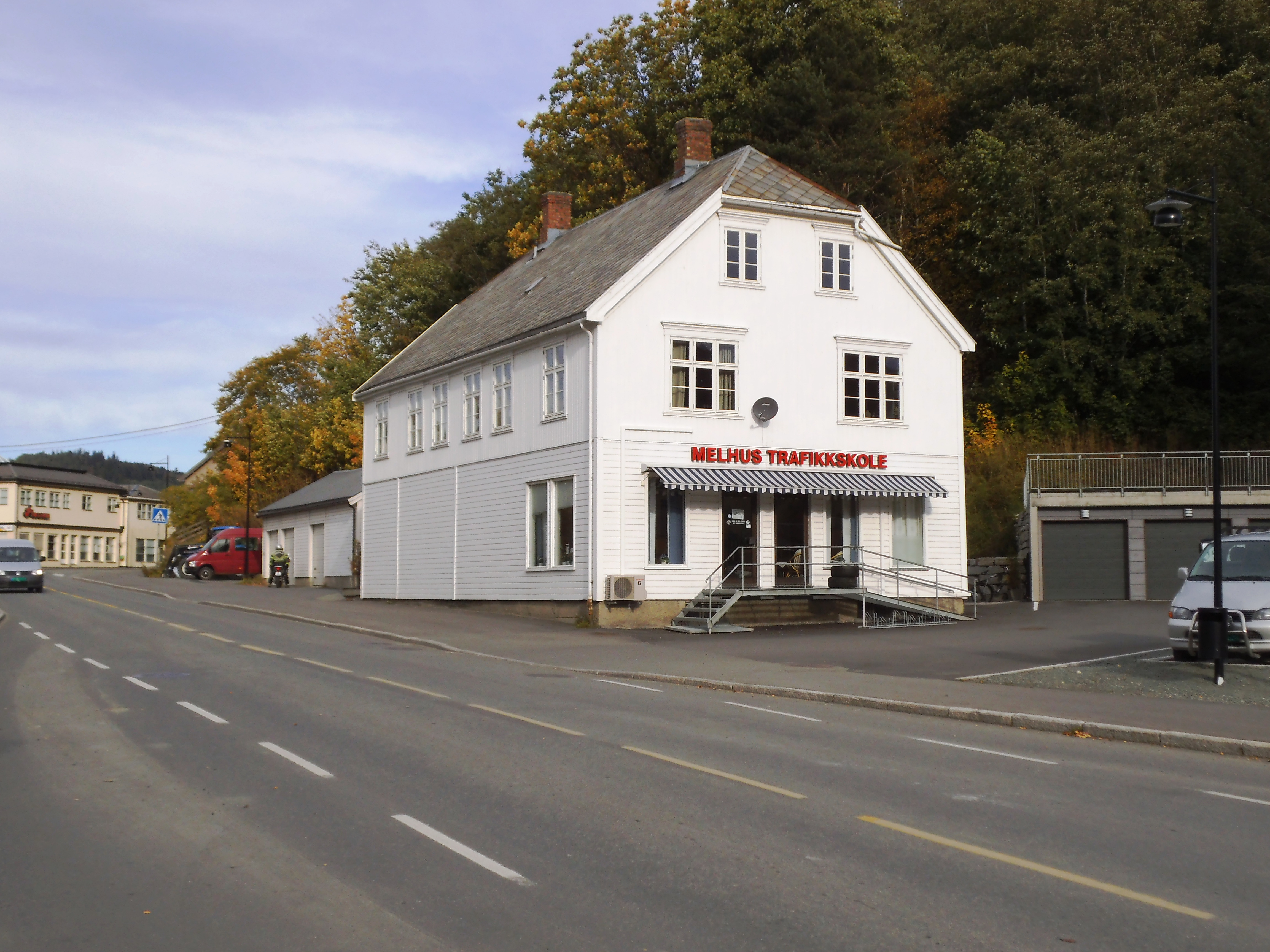 En eldre bygning i Melhus sentrum som i dag (2012) huser Melhus trafikkskole. Den var opprinnelig en kolonialbutikk etablert av Johan A. Lorvik